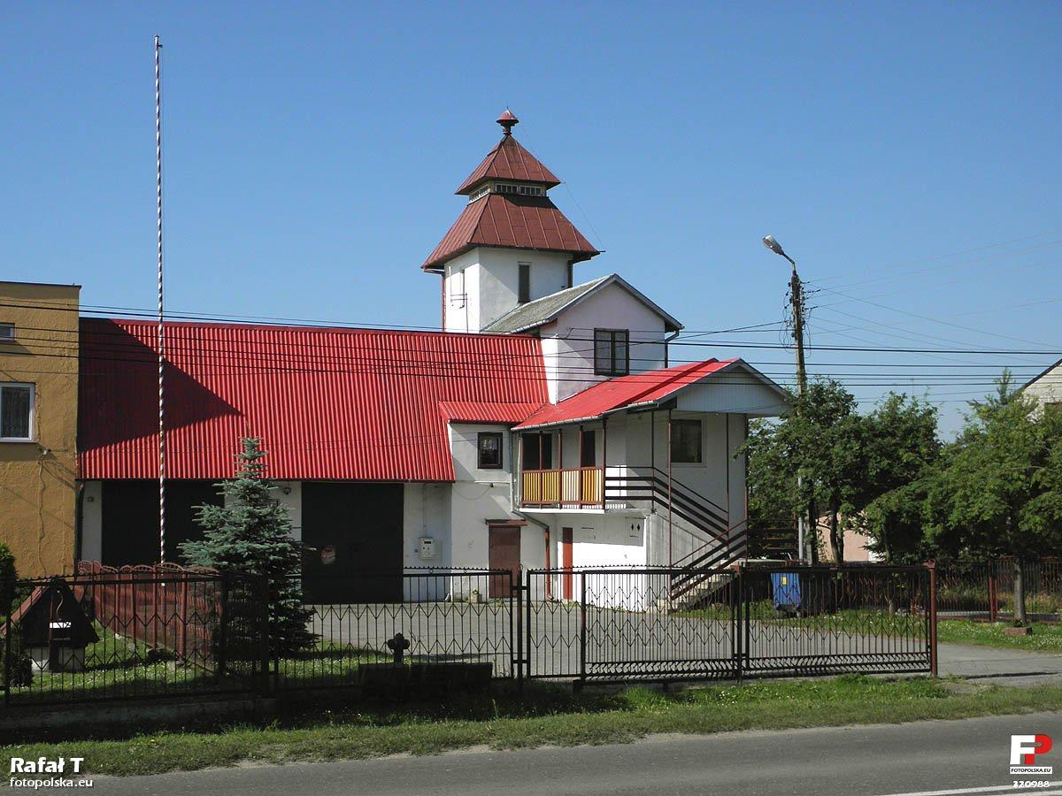 Remiza OSP w Grzybowej Górze.